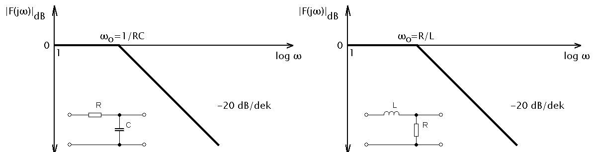 Logarimická ampl. frekvenční charakteristika intergračního článku